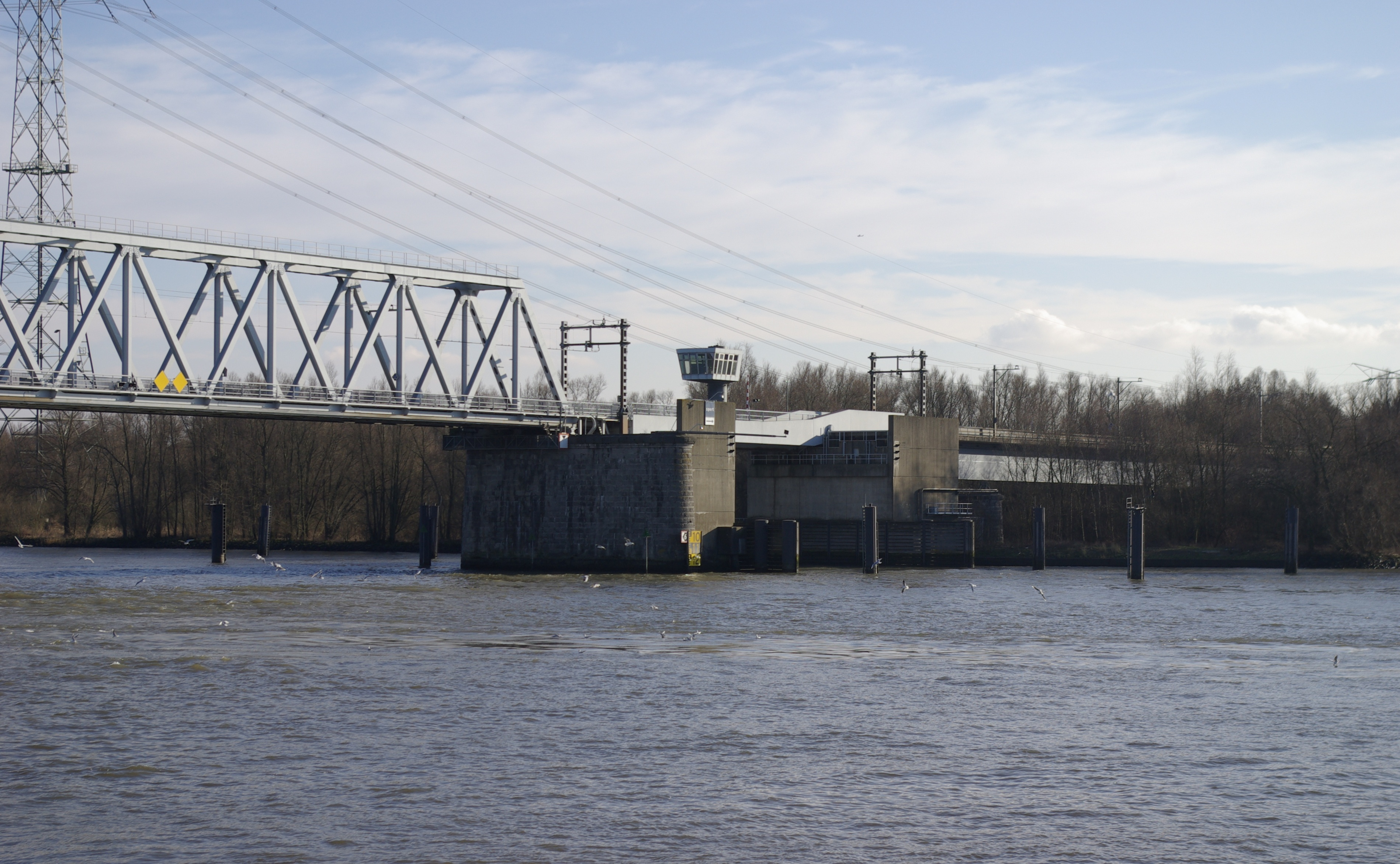 Baanhoekbrug